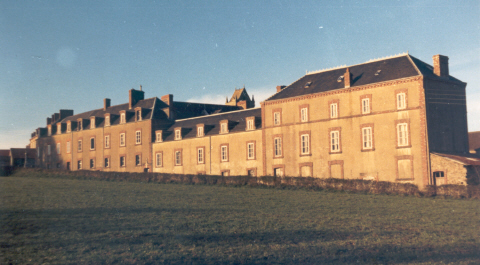 Biville 1979, l'ancien orphélinat